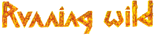 Логотип группы Running Wild